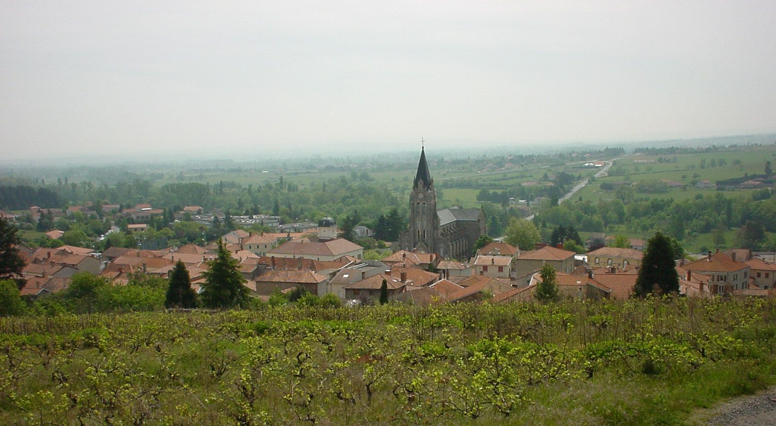 Village de Renaison vu du lieu dit St Roch